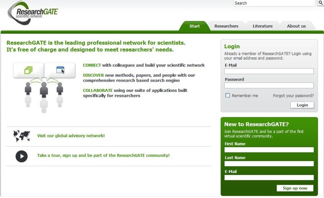 Startseite von ResearchGATE